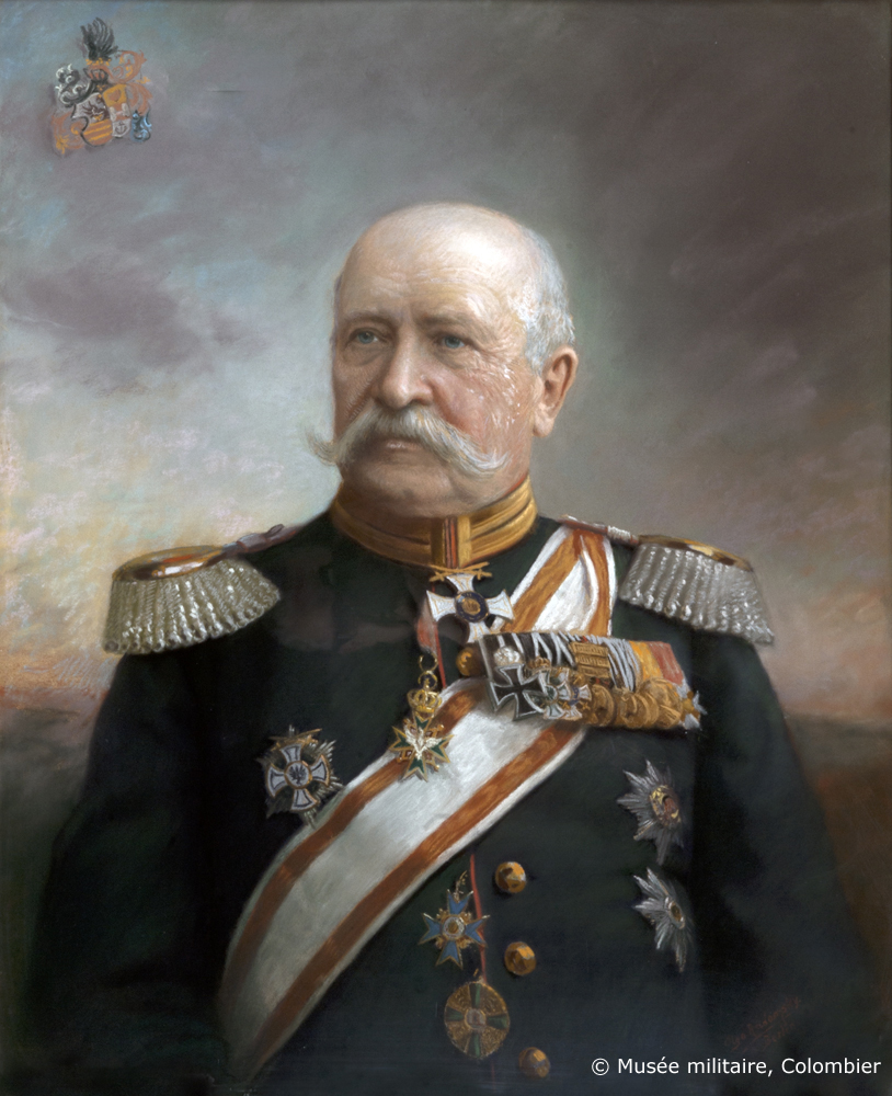 Porträt um 1890